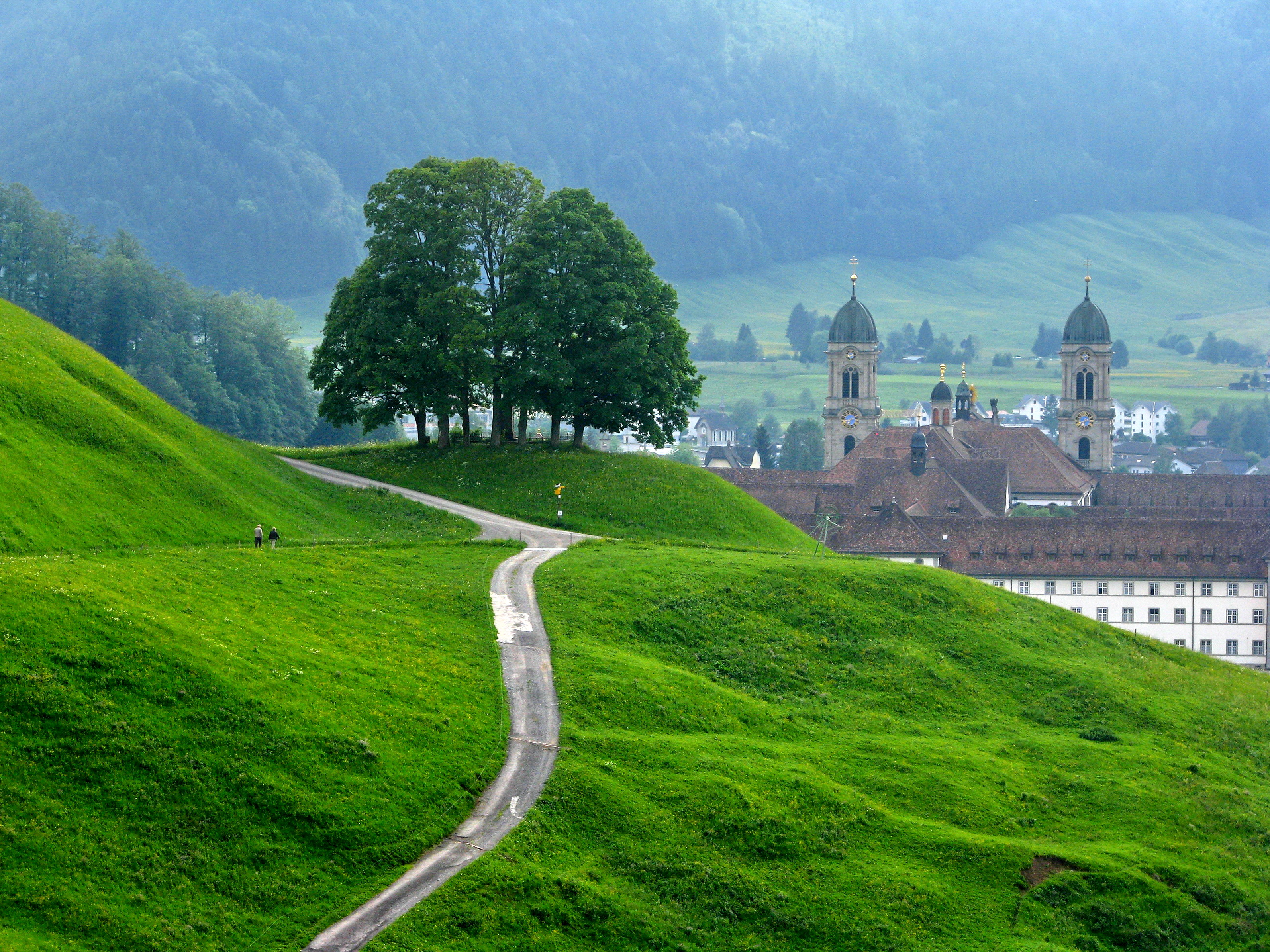 Einsiedeln (SZ) in Switzerland